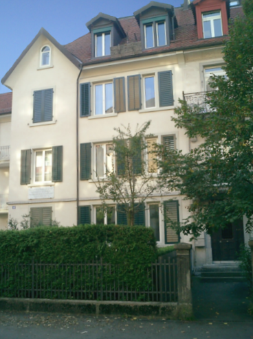 Wohnort von Heinrich Federer in Zürich während seiner letzten Jahre, Eigenaufnahme von Mgloor